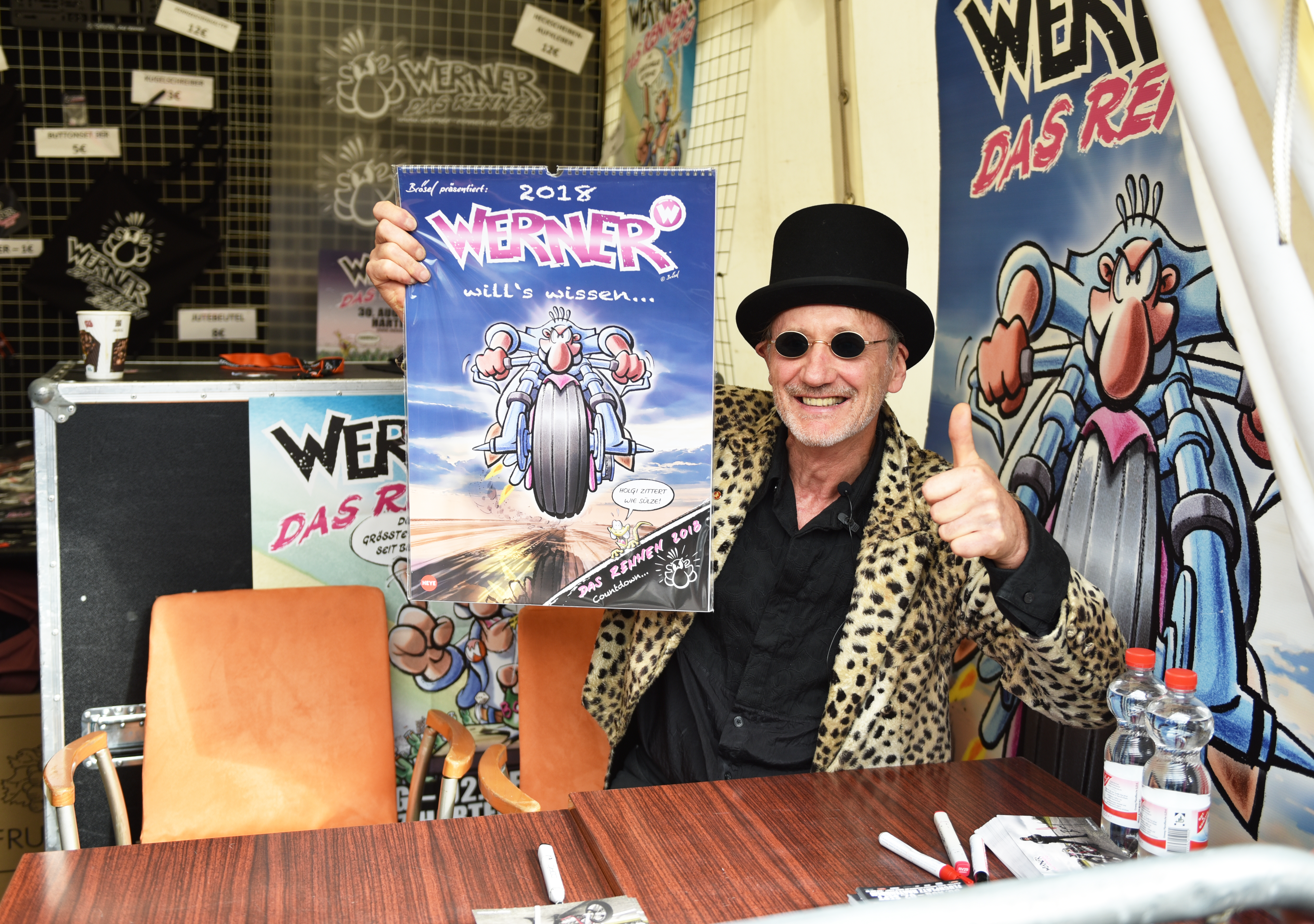 Brösel bei den Hamburg Harley Days 2017